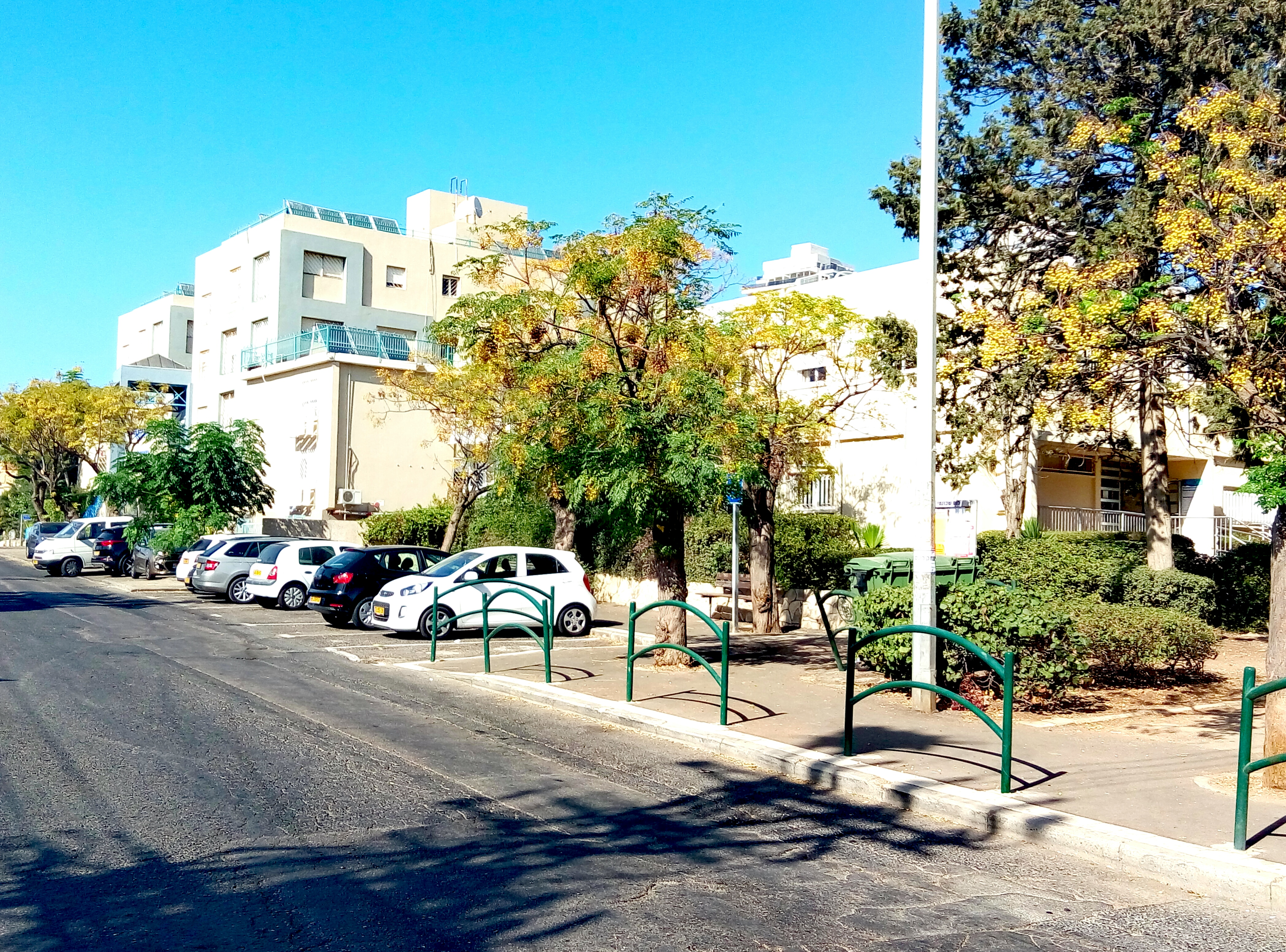 בשכונת נווה דוד בחיפה